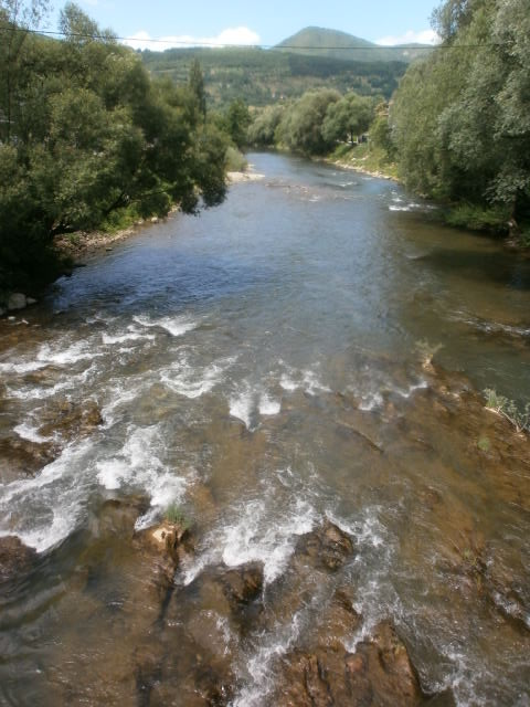 Амбијентална цјелина Ћерезлук This image was uploaded as part of Trace of Soul 2015.